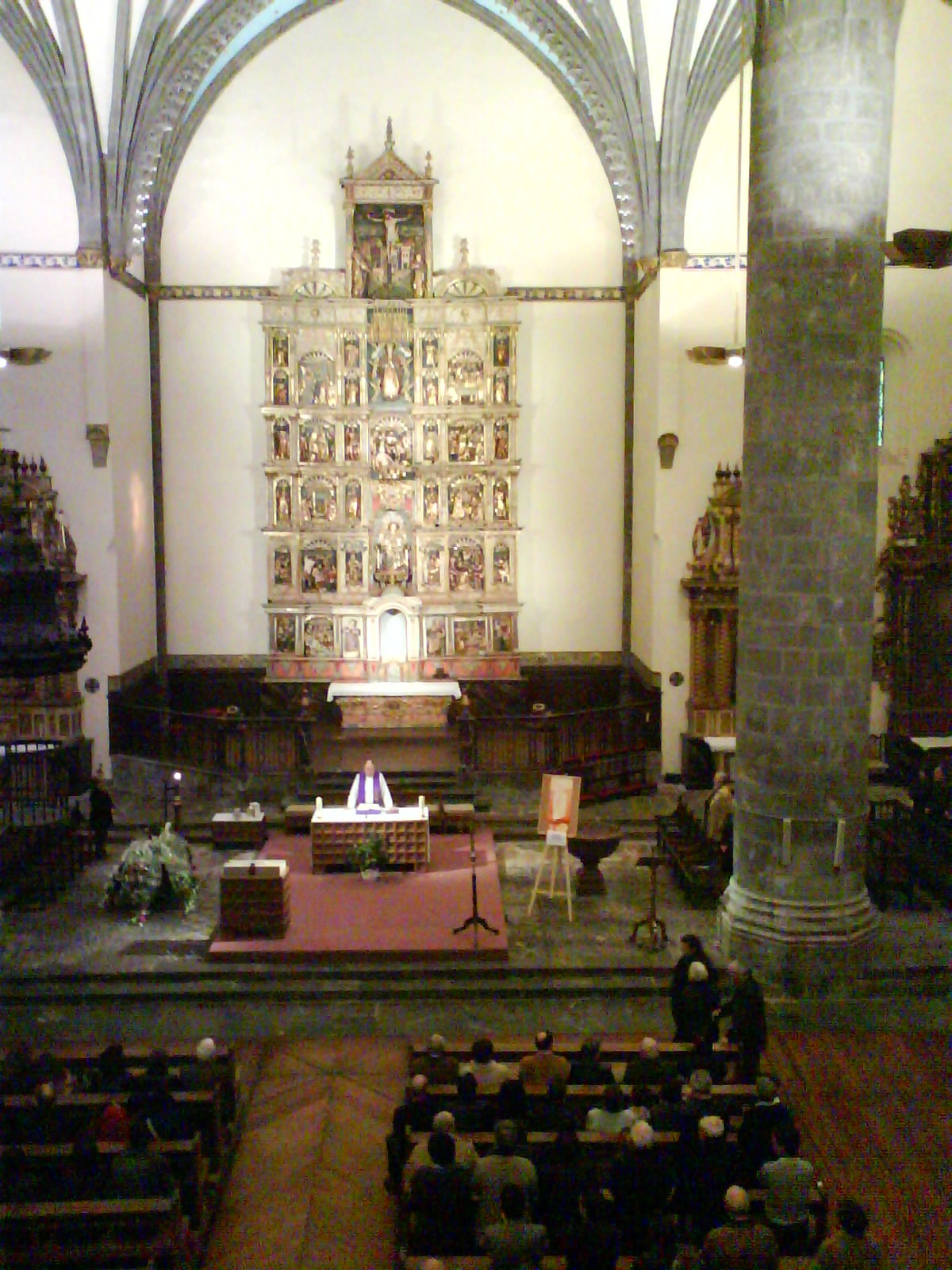 Iglesia de Santa María de la Asunción en Markina, Vizcaya, País Vaco, España.